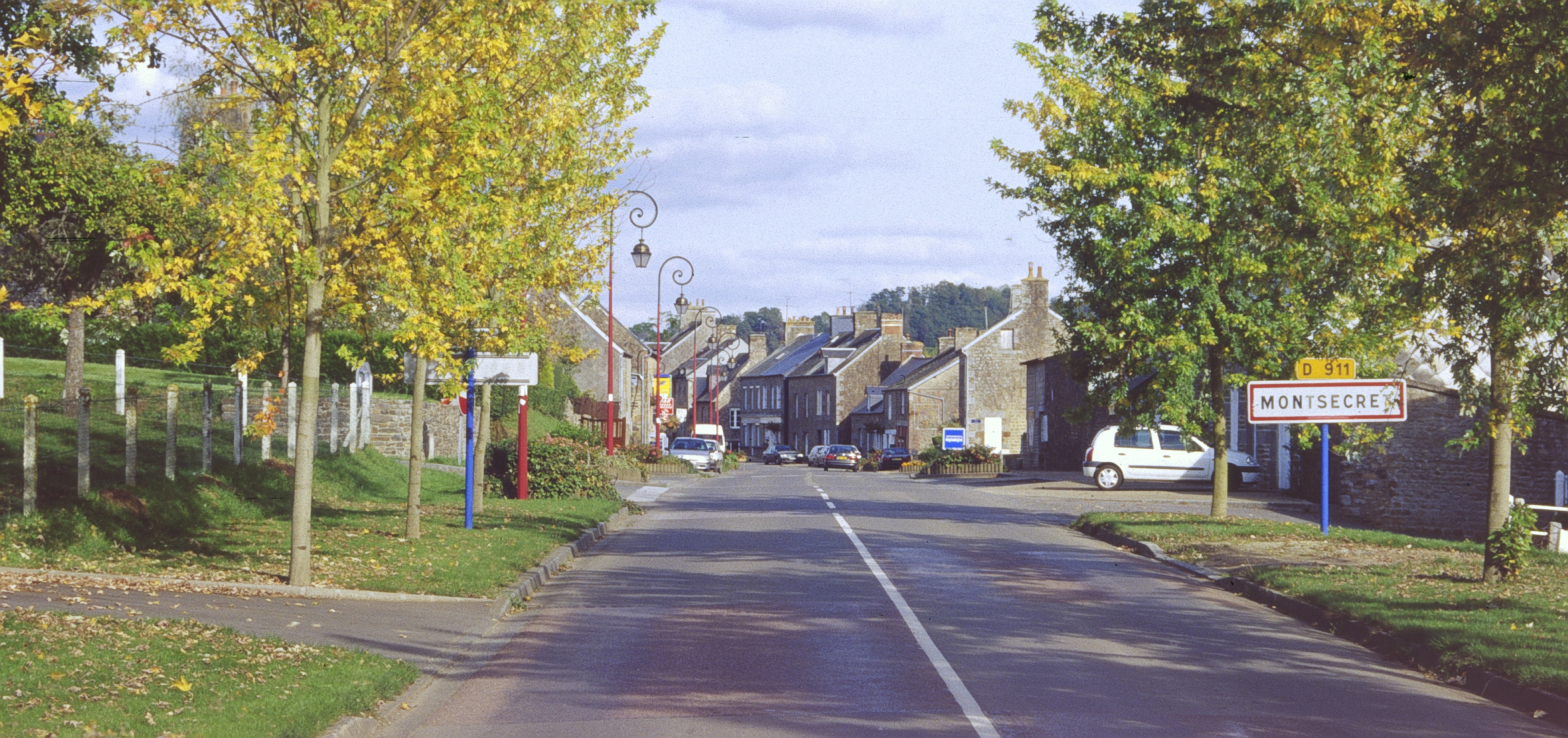 Village Montsecret in Orne (61) France